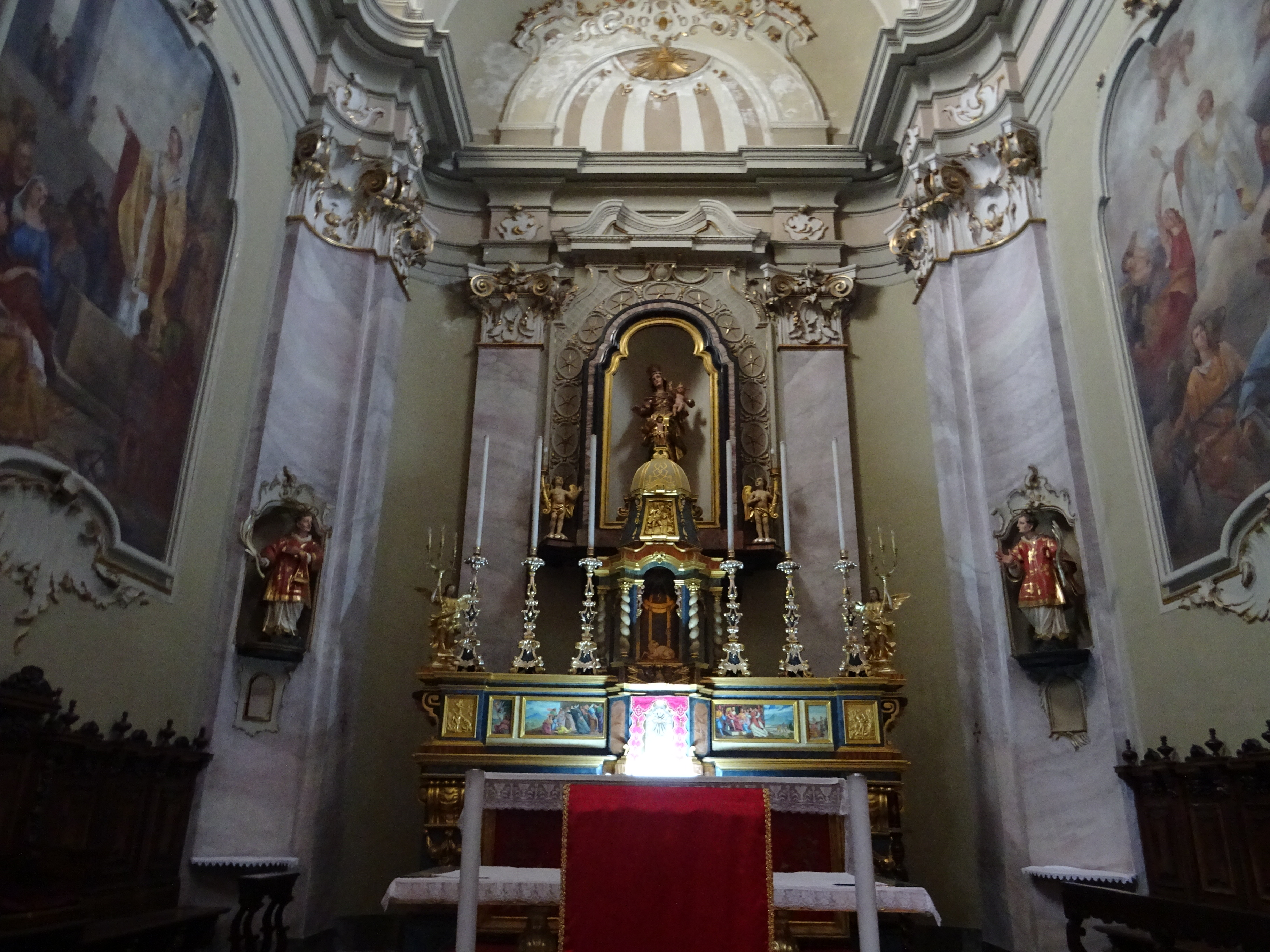 Santuario di San Vincenzo a Cernobbio